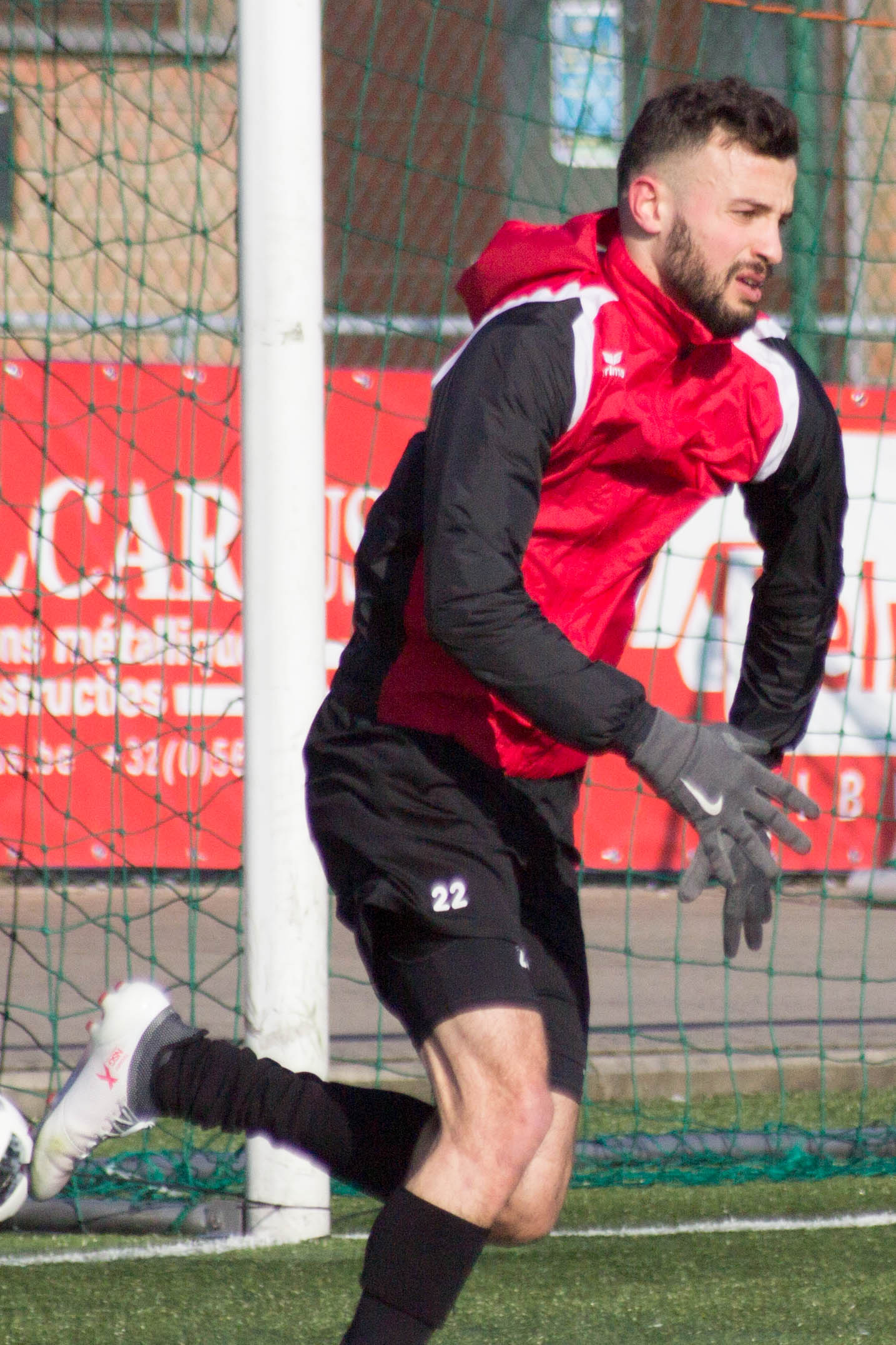 Entraînement du Royal Excel Mouscron, au Futurosport( Mouscron). Le 22 février 2018.